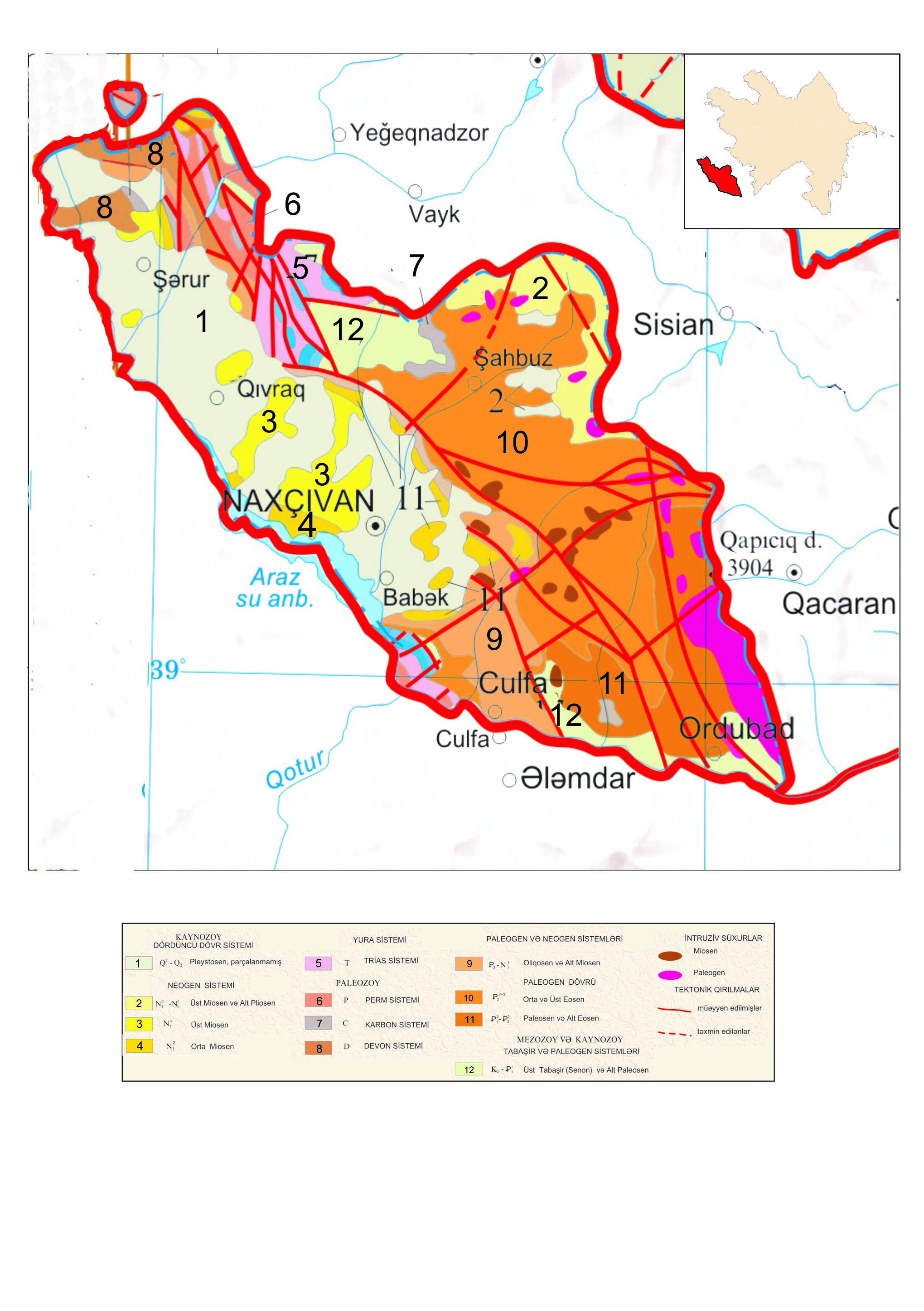 Orta Araz təbii vilayətinin geoloji xəritəsi.